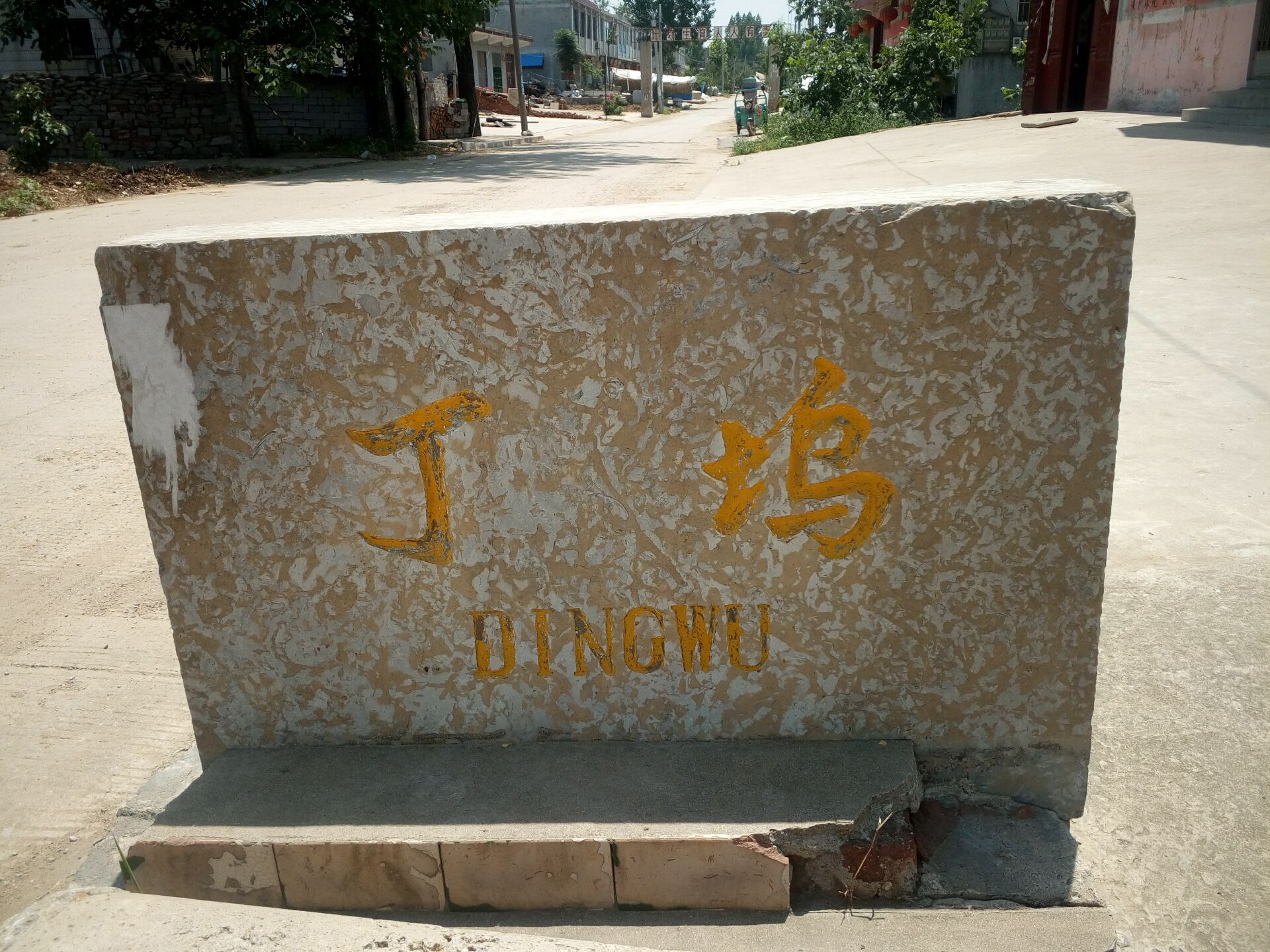 大羊镇丁坞村